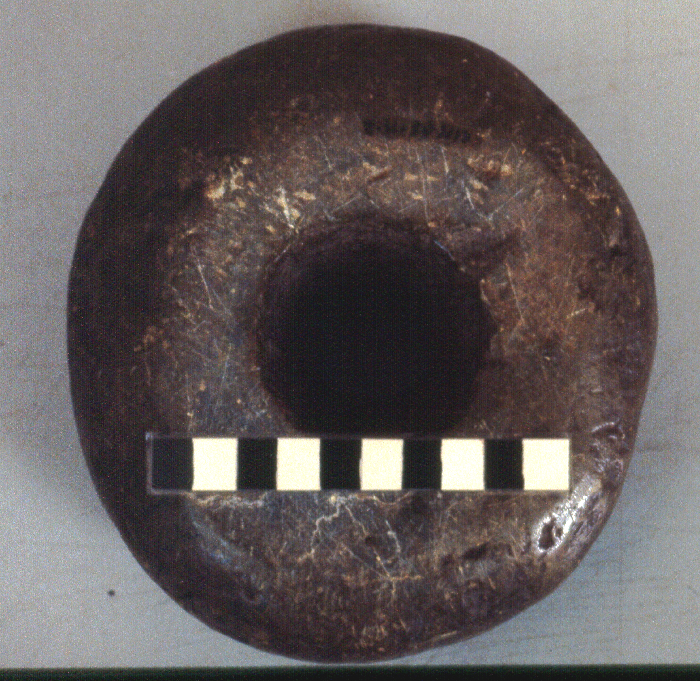 Pierre polie de Cote d'Ivoire